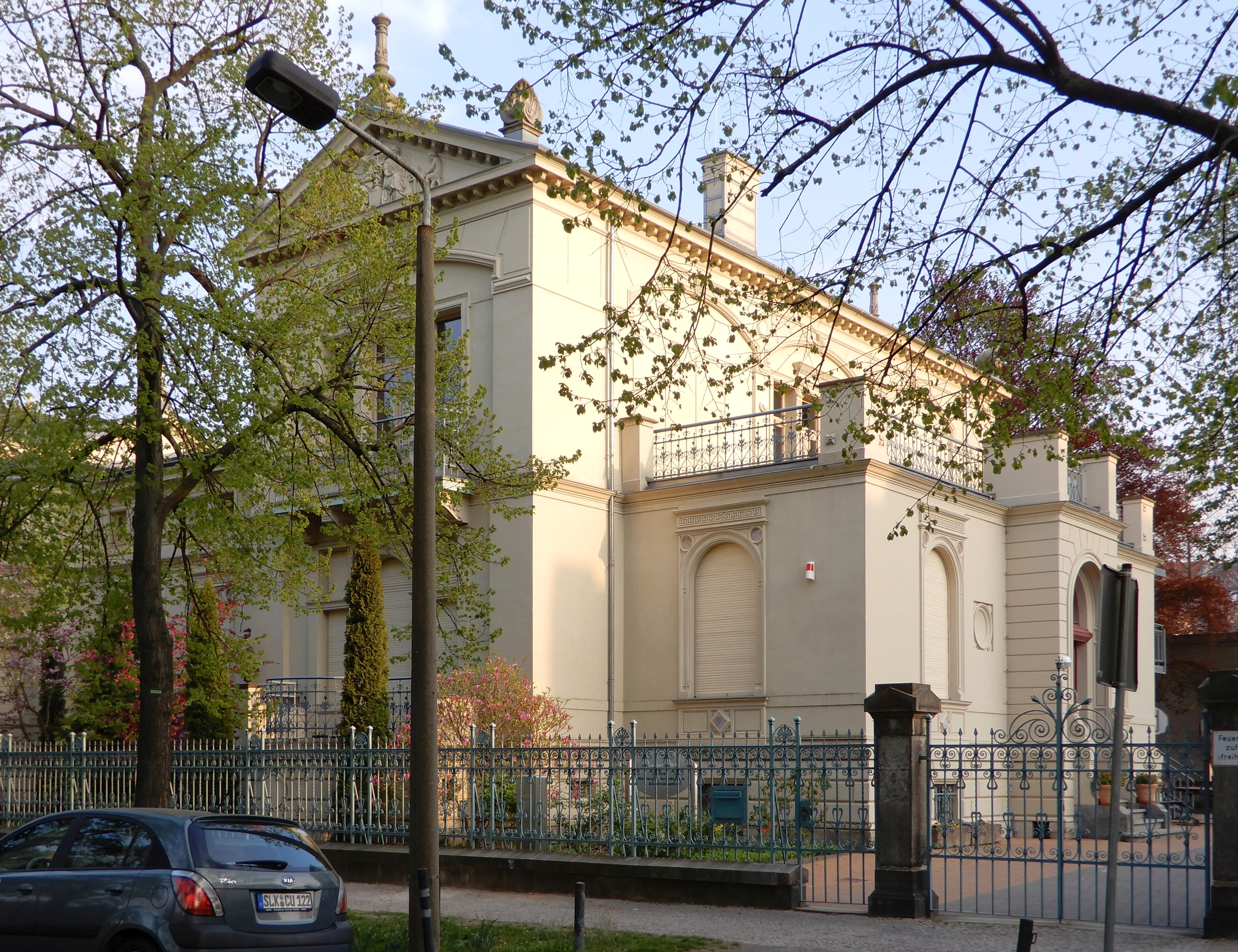 Gebäude Bestehornstraße 4 in Aschersleben